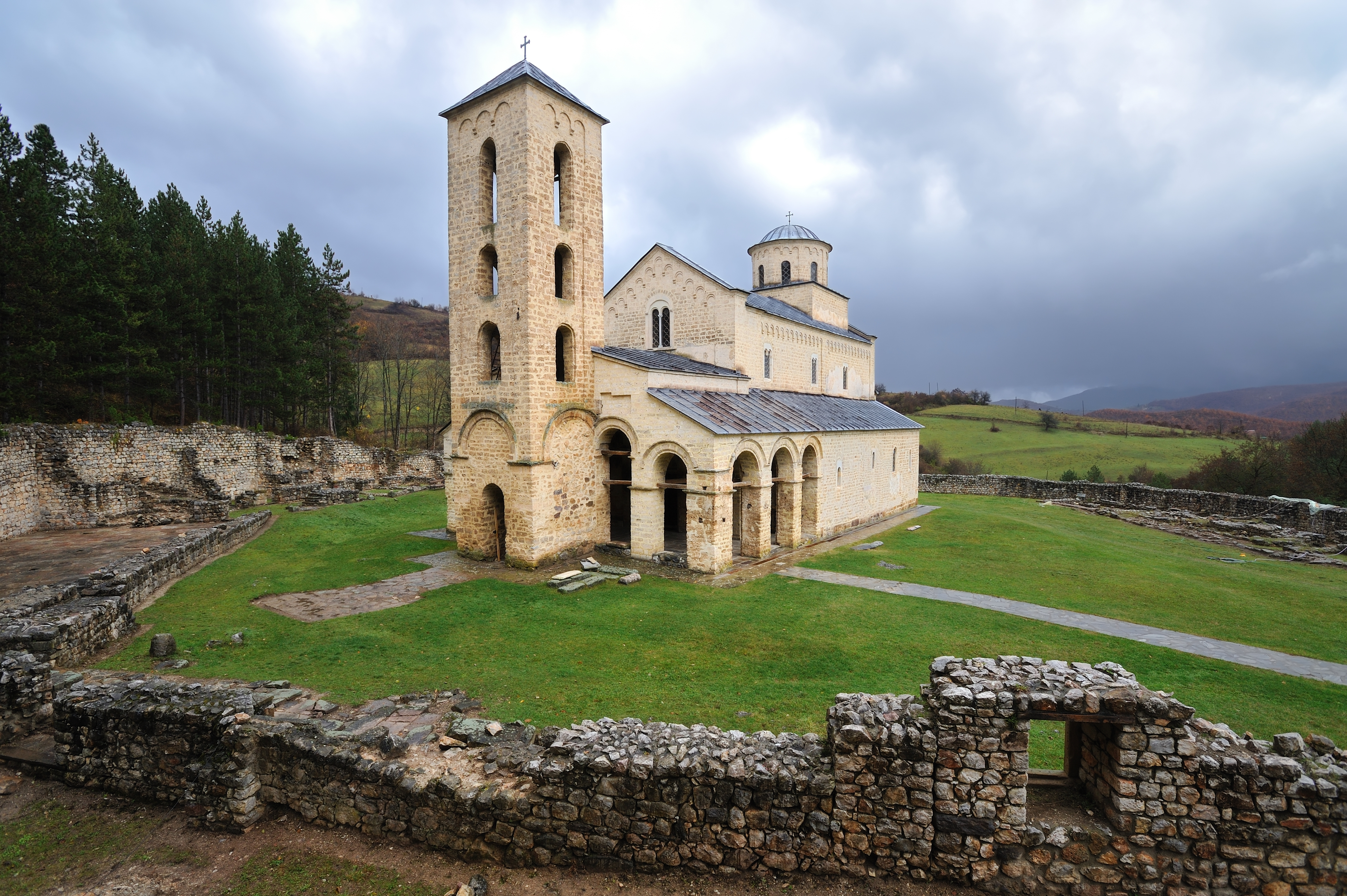 Manastir Sopocani